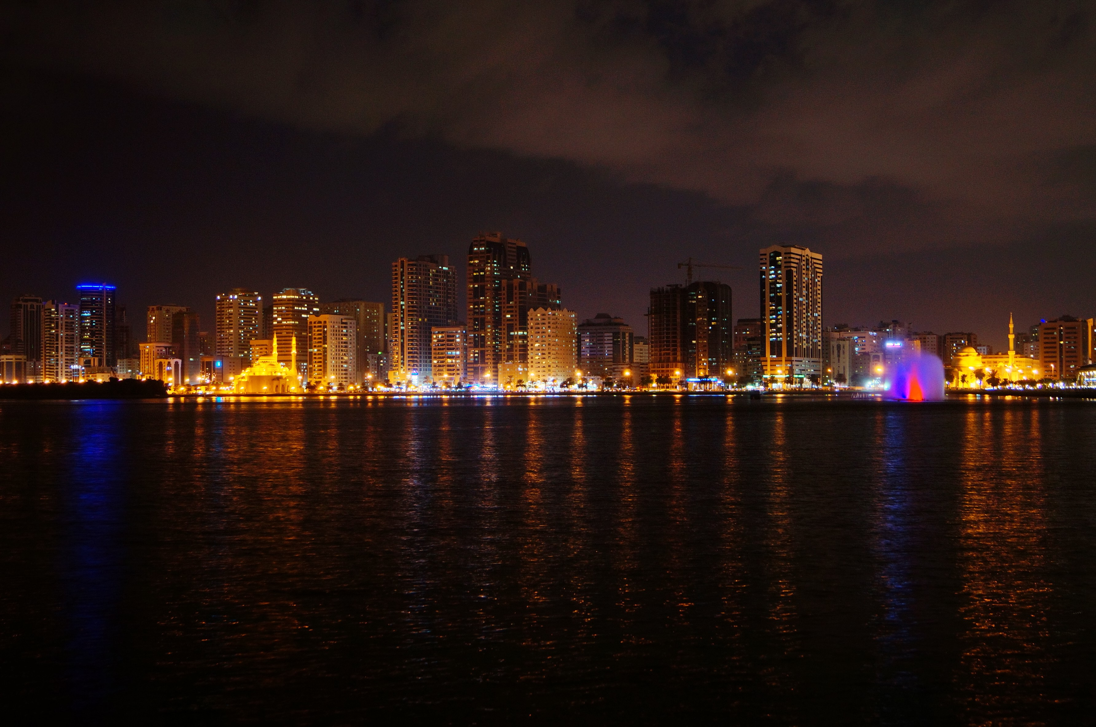 Sharjah - Nigh time pHOTO